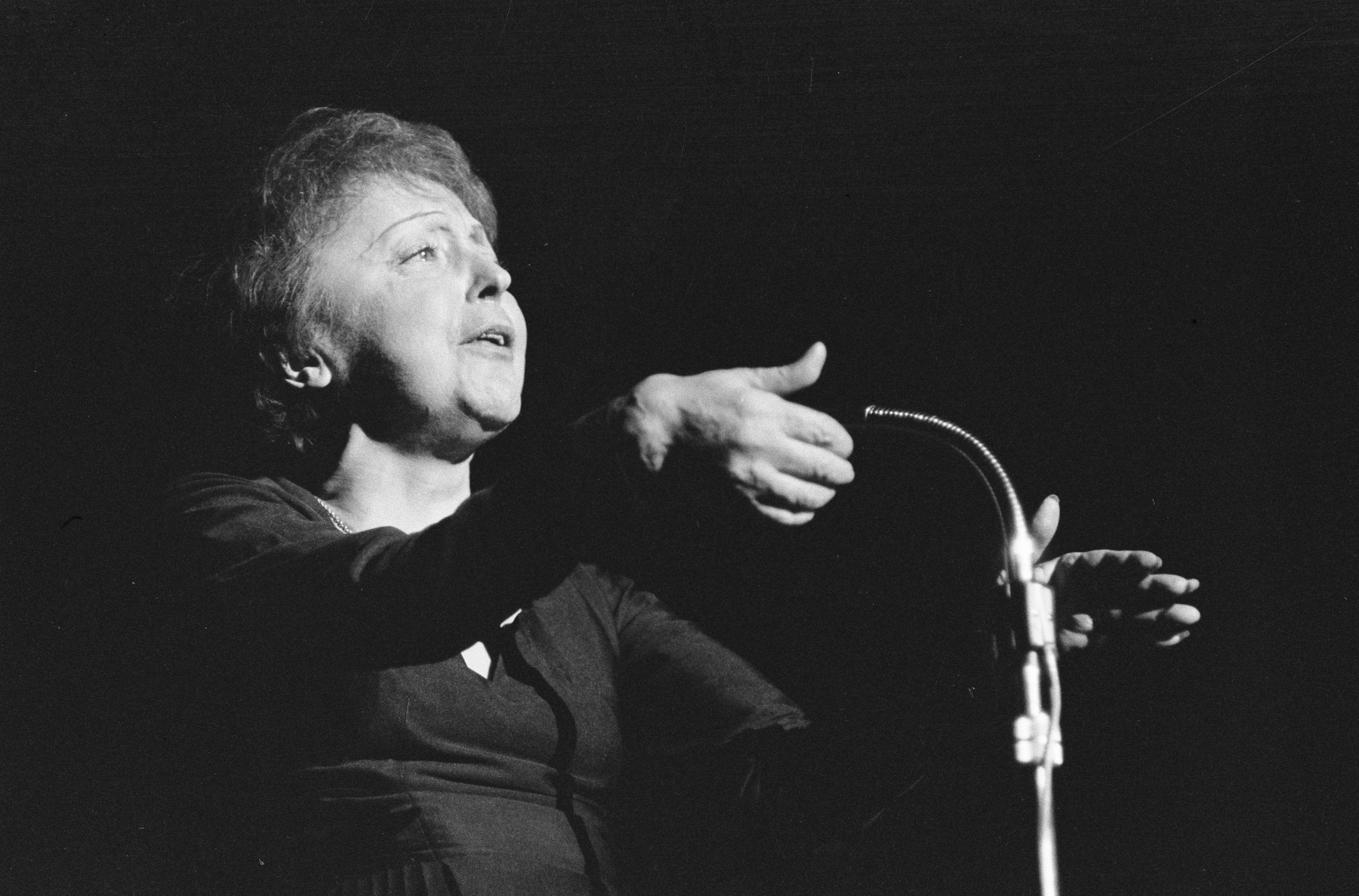 Édith Piaf tijdens een optreden in Rotterdam.